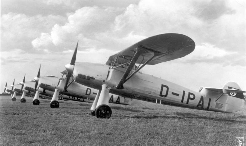 Focke-Wulf Übungsflugzeug Fw. 56 "Stösser"